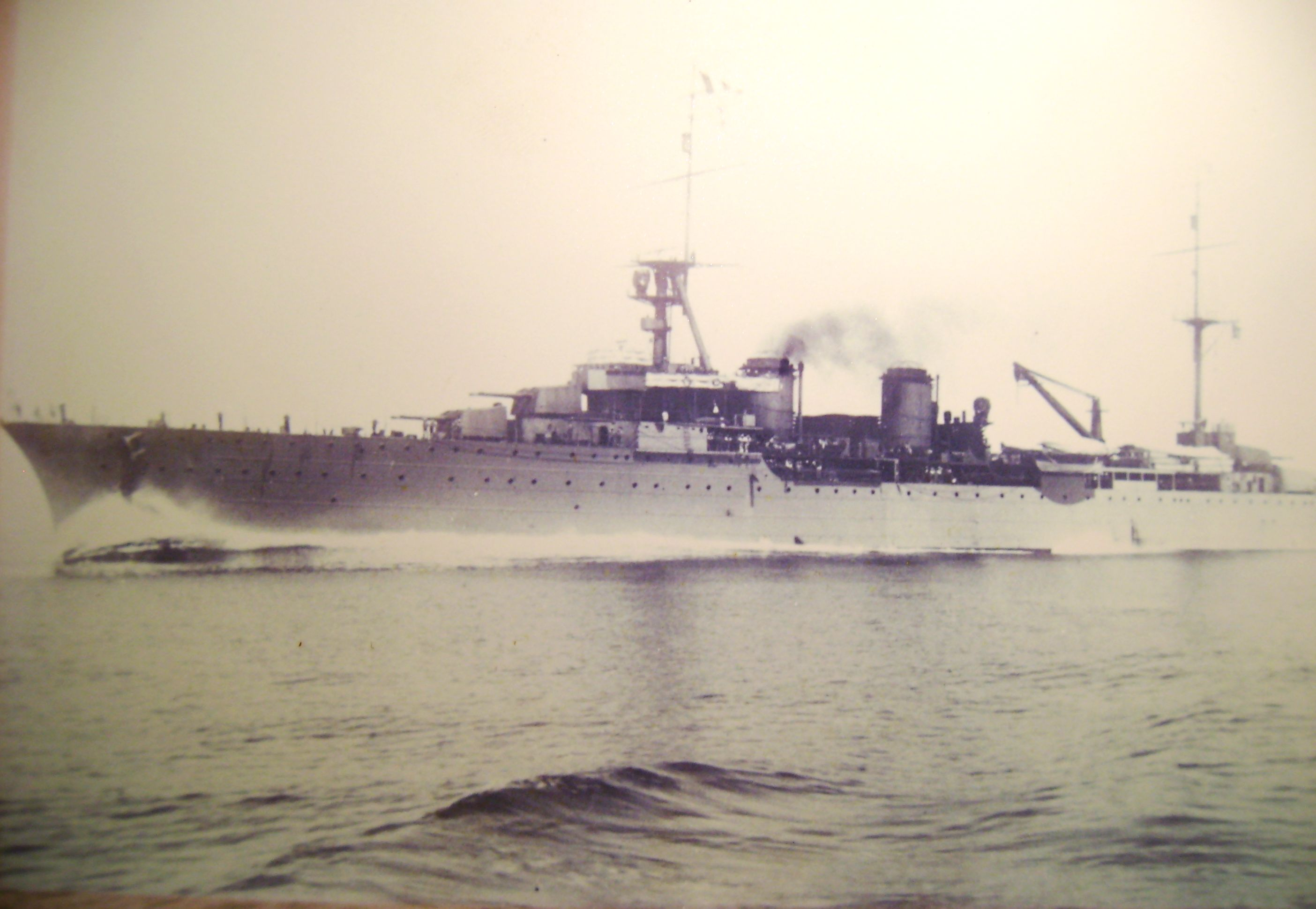 Croiseur Primauguet 1924-1942 commandé par le capitaine de vaisseau Pierre Goybet. en 1940 Debarquement d'Aruba et Transport ORr Banque de France